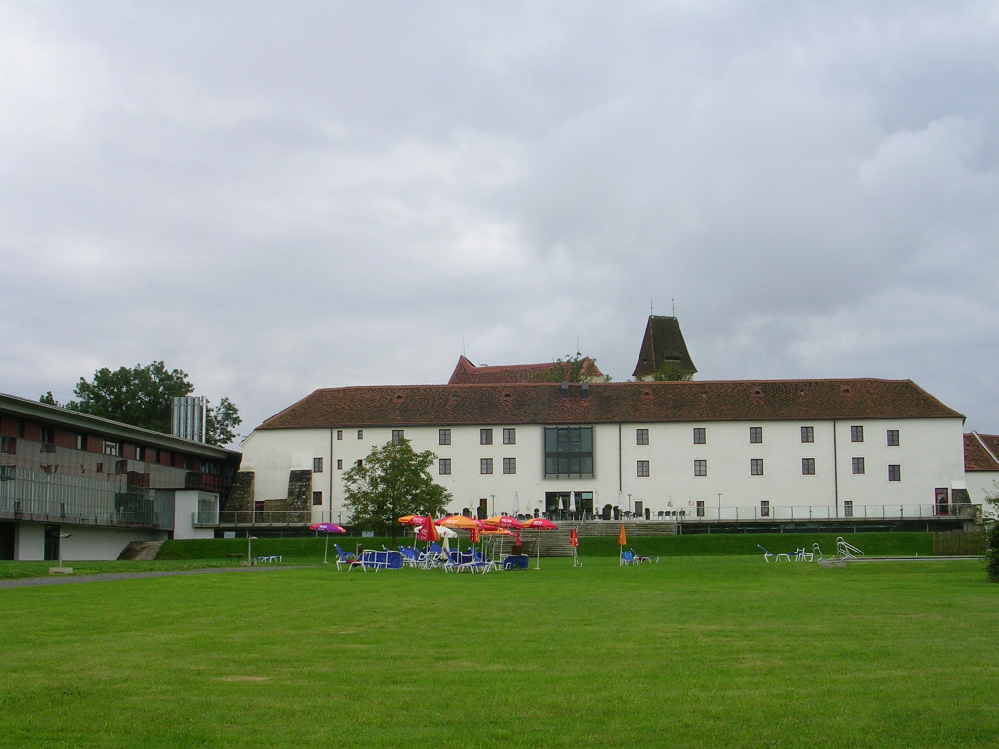 Schloss Seggau in der Gemeinde Seggauberg (Bezirk Leibnitz).